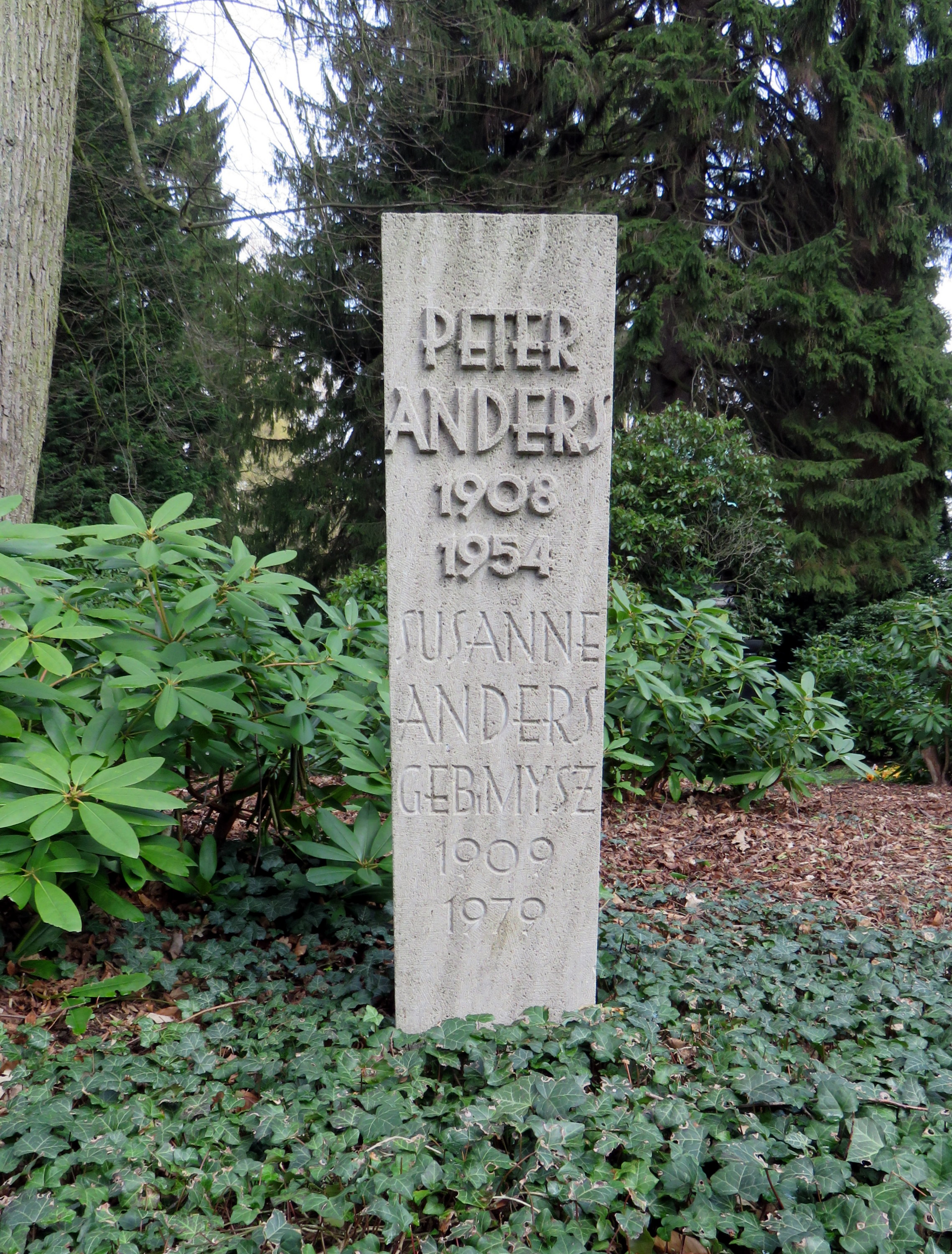 Grabmal des deutschen Sängers (Tenor) Peter Anders auf dem Hamburger Friedhof Ohlsdorf, Planquadrat Q 6 (oberhalb des Althamburgischen Gedächtsnisfriedhofs).